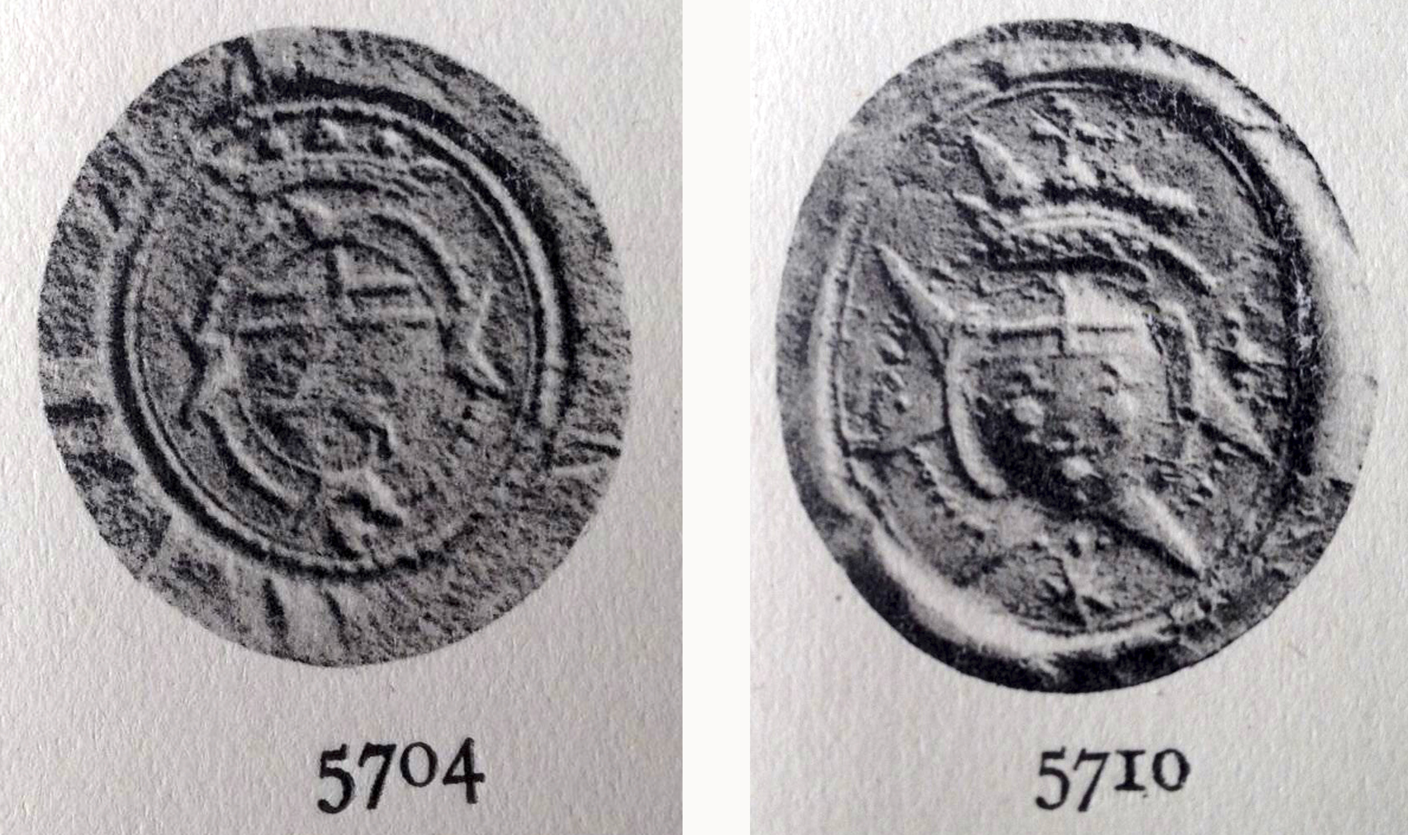 Segells de dos comanadors de Bajoles: Núm. 5704, Nicolau Abri-Descallar, any 1758. Núm. 5710, Ramon de Copons, any 1776 (Ferran de Sagarra. Sigil·lografia Catalana, vol. III, Barcelona, 1932)